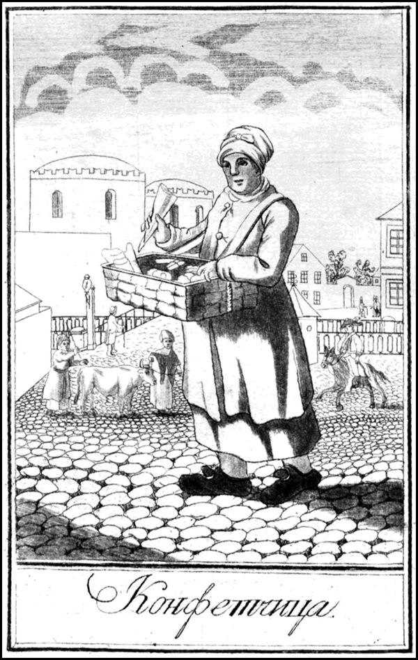 «Национальных изображениях Промышленников, снятых с натуры в Санкт-Петербурге», изданных в 1799 Я. И. Басиным.